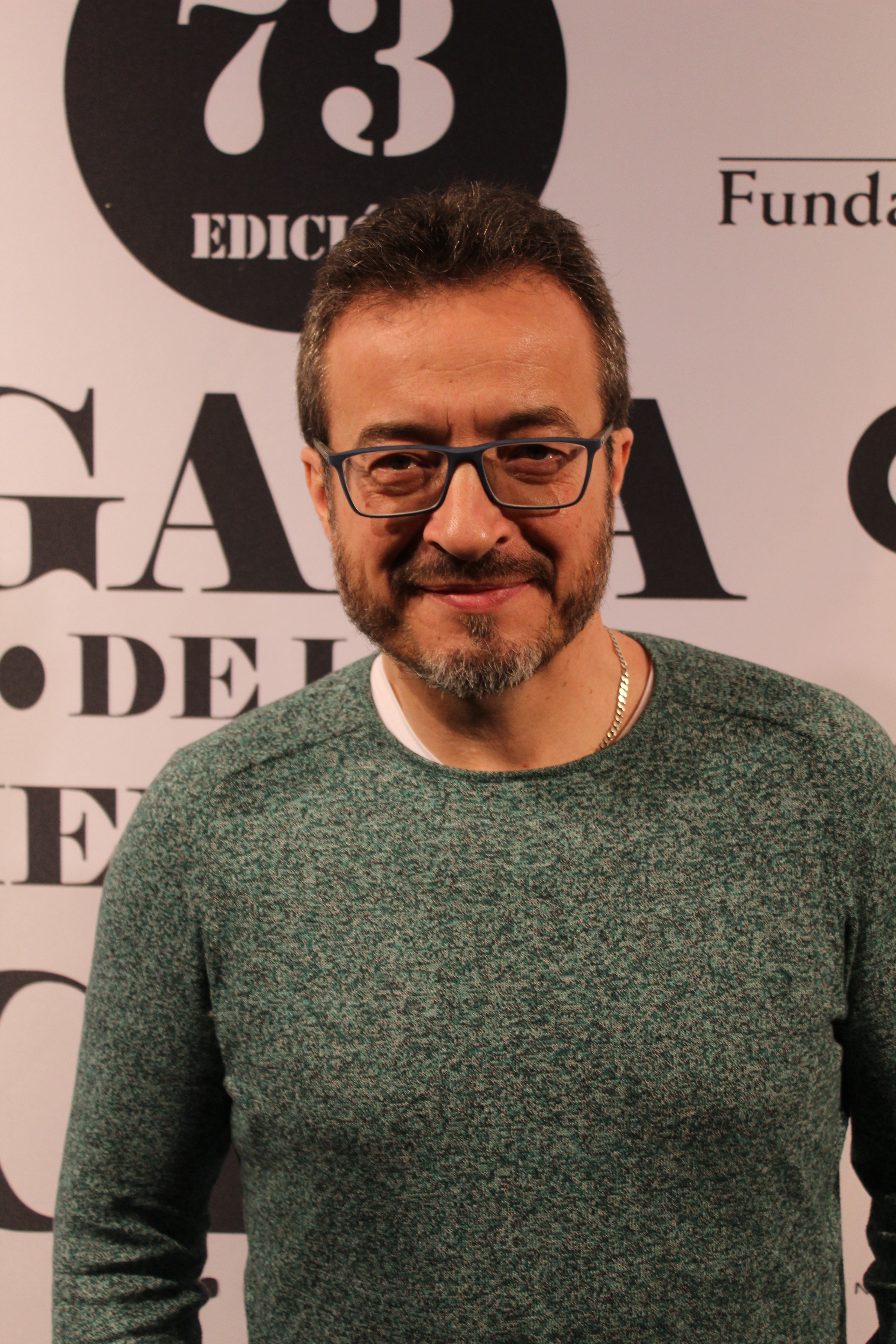 El compositor español Roque Baños en la 73 edición de las Medallas del Círculo de Escritores Cinematográficos.